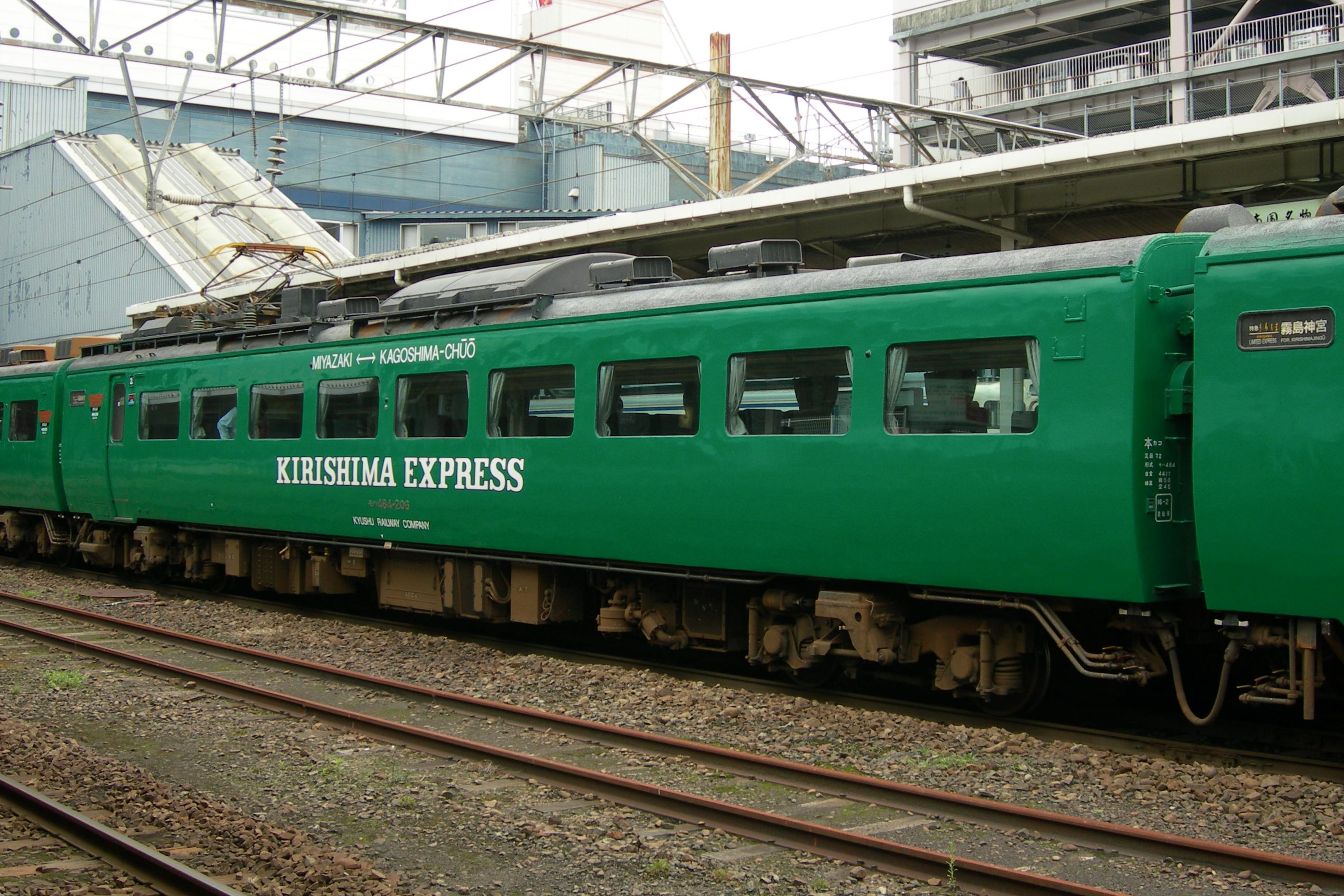 485系モハ484-206